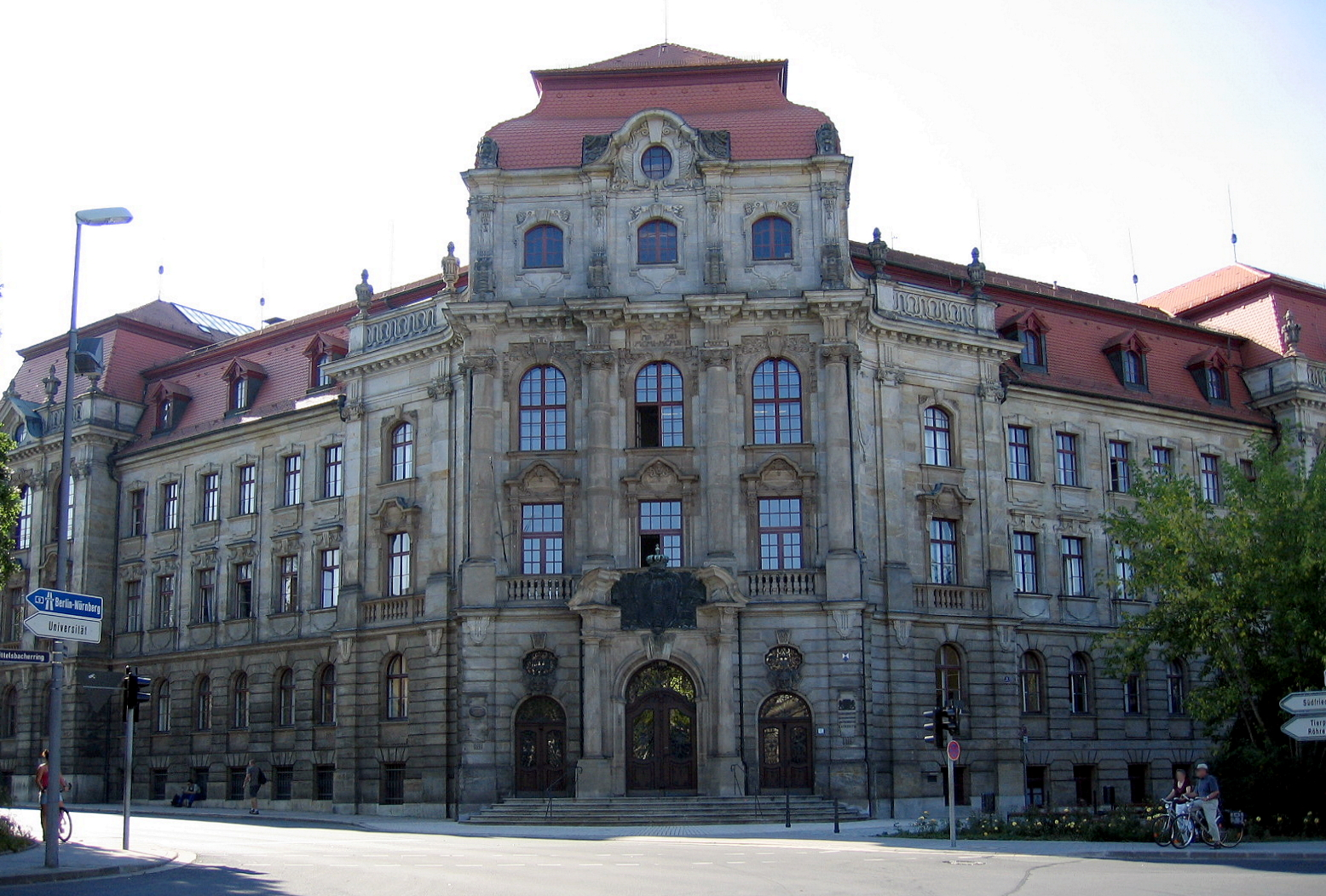 Justizpalast; Landgericht, Staatsanwaltschaft und Amtsgericht, Wittelsbacherring 22 in Bayreuth (Germany)